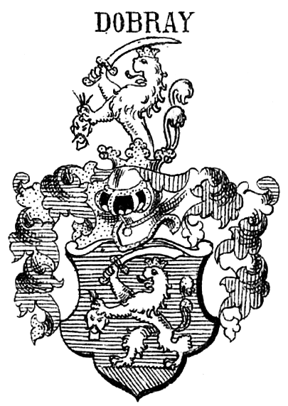 Wappen der Familie Dobray veröffentlicht in "Siebmacher's grosses und allgemeines Wappenbuch - Band: Der Ungarische Adel" (1894), Tafel 109.